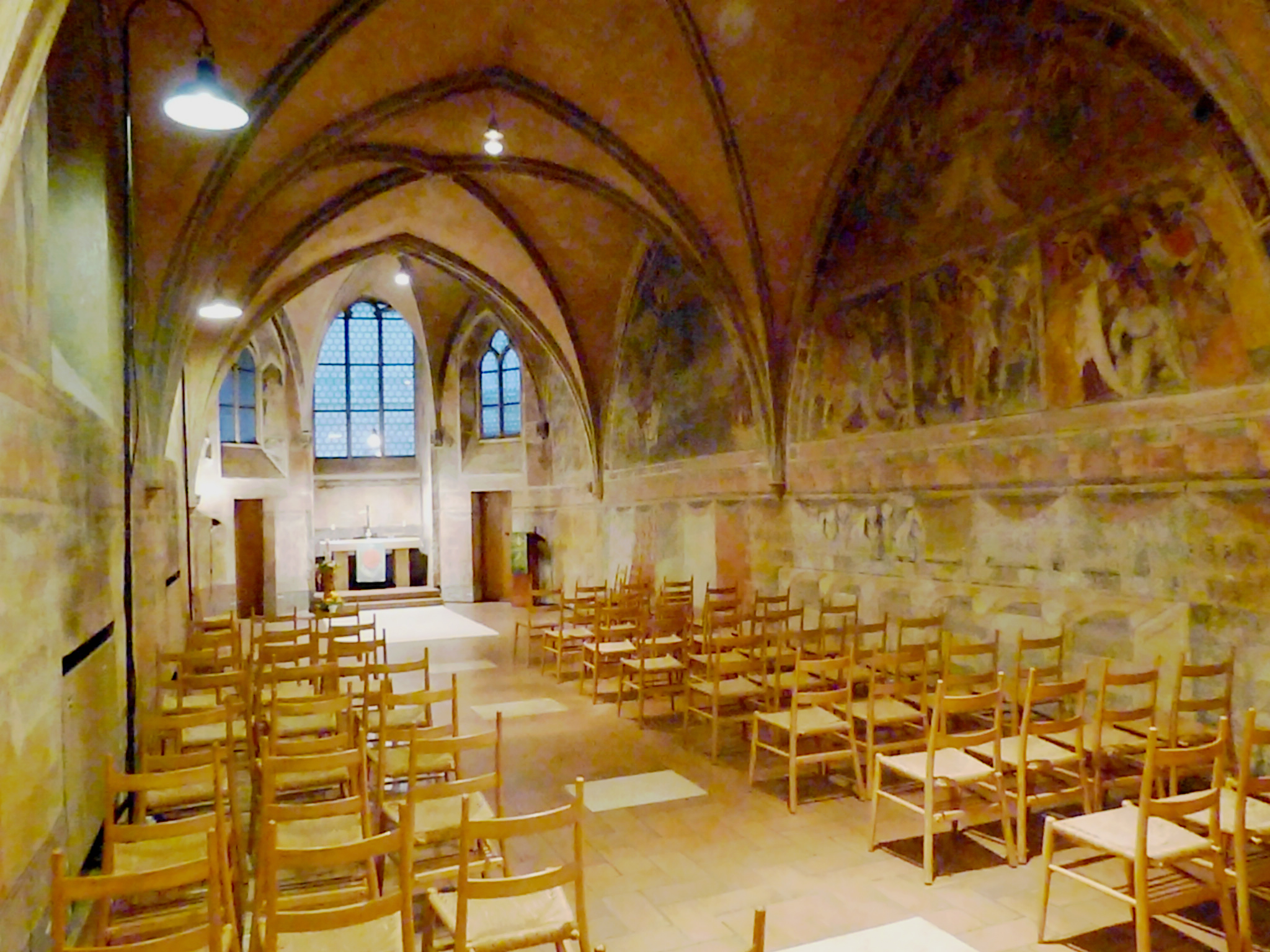 Fuggerkapelle in St. Anna, Augsburg, Bayern